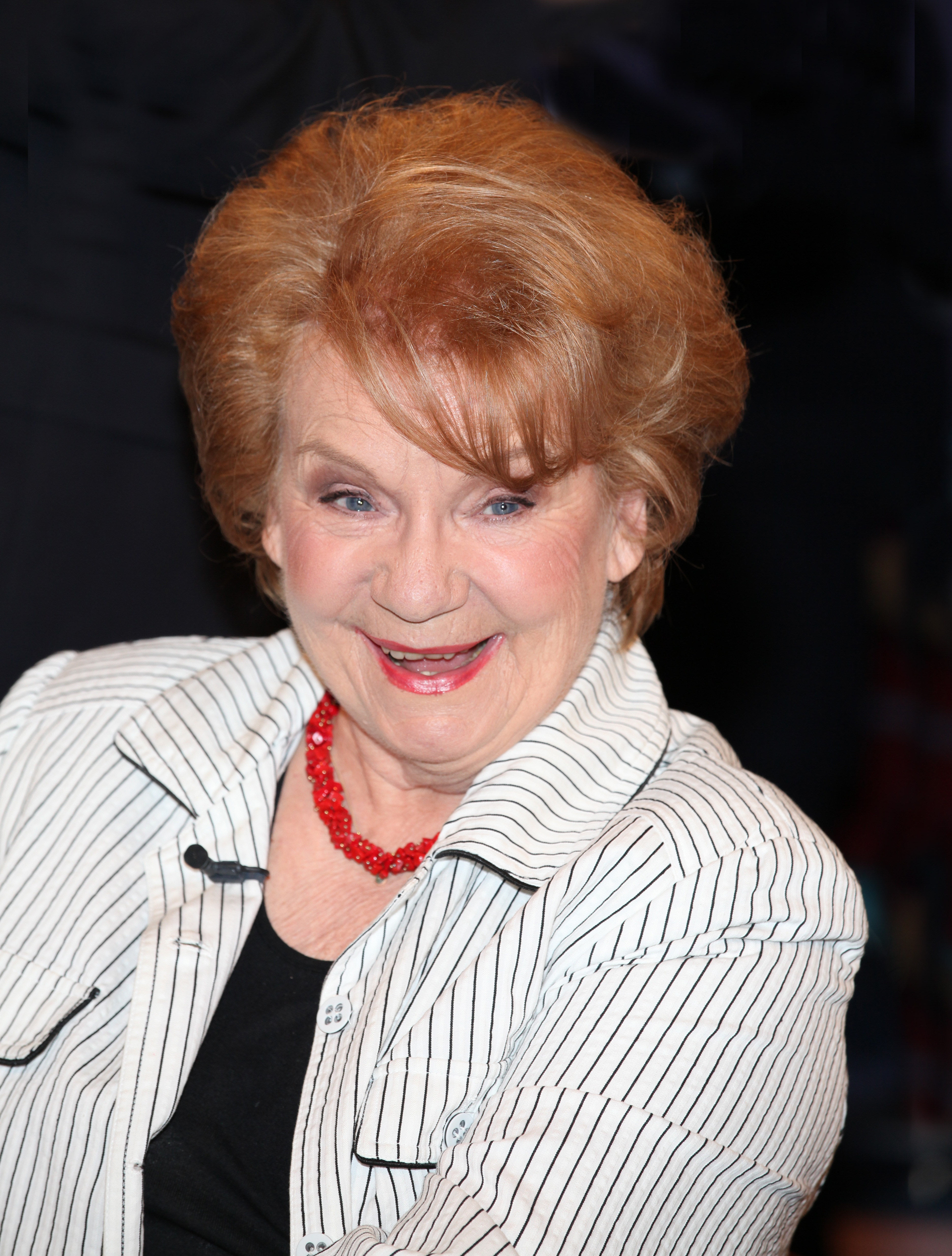 Ingeborg Krabbe, auch Ingeburg Simmich-Krabbe, 13. Juni 1931 in Leipzig, Sachsen ist eine deutsche Schauspielerin. Inhaltsverzeichnis